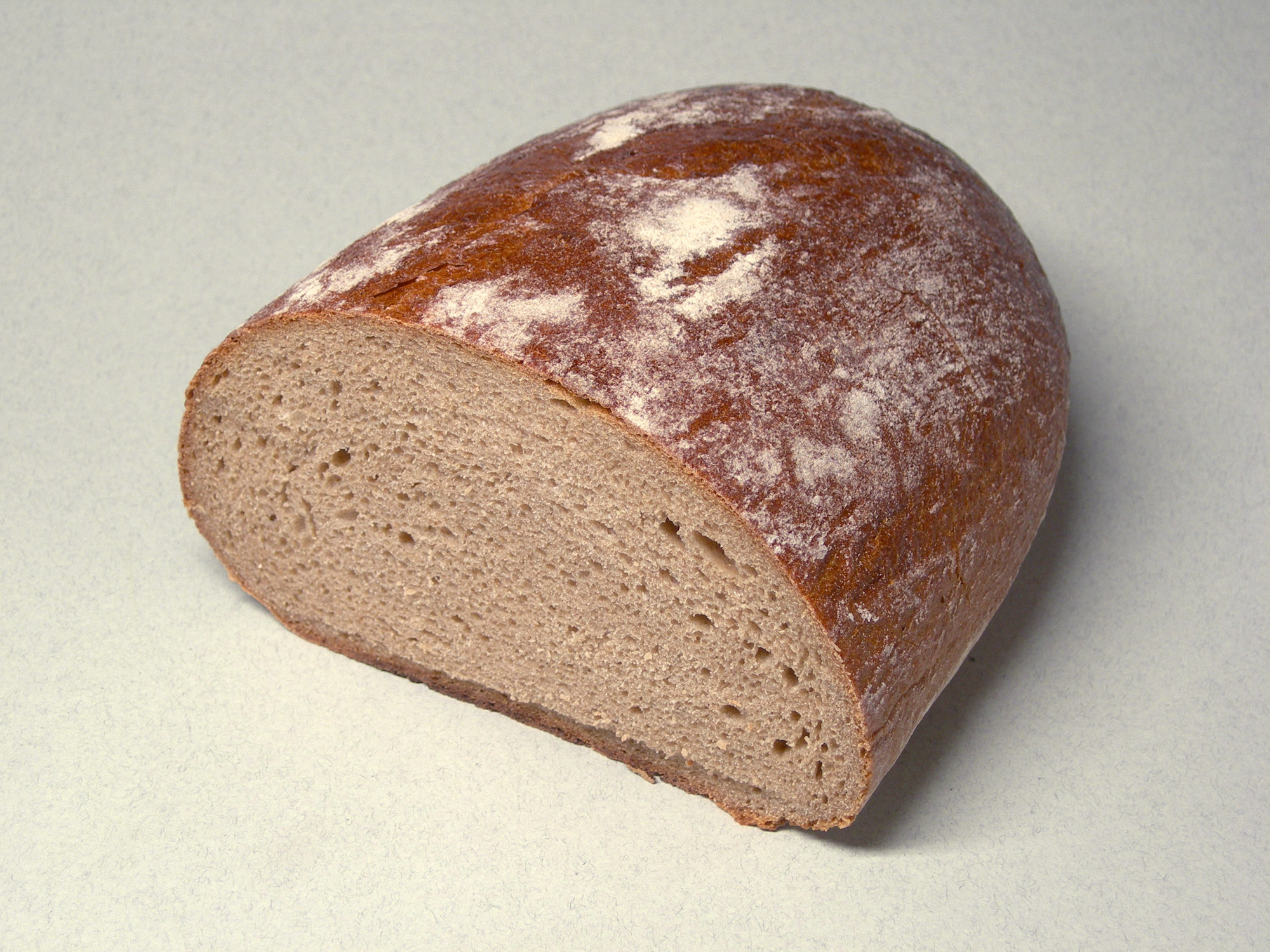 Roggenmischbrot aus Österreich. Eigene Aufnahme. (white rye-type bread) Andere Version: File:Krume Kruste.jpg